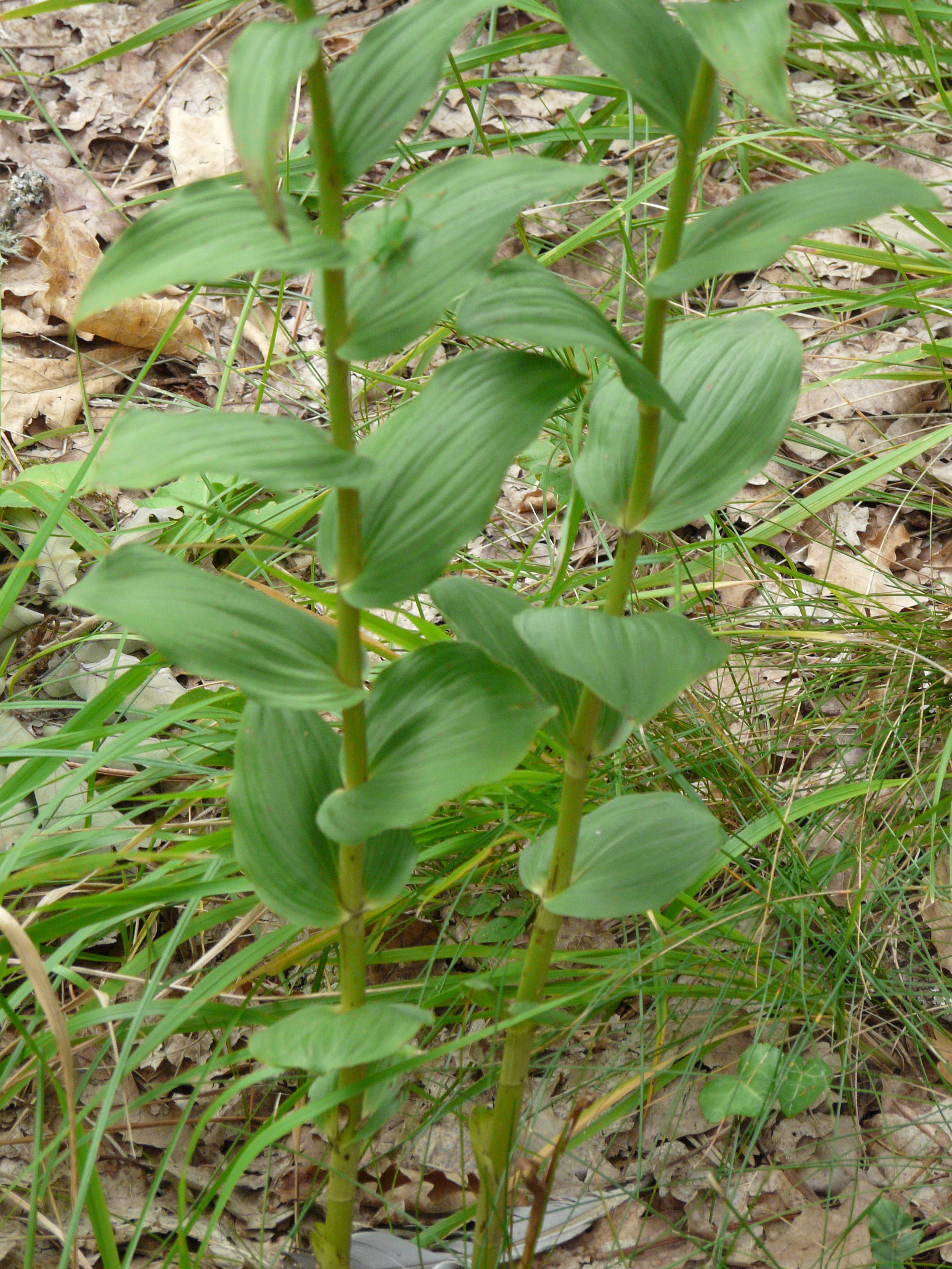 Feuilles d'Épipactis à larges feuilles (Epipactis helleborine), Trélissac, Dordogne, France